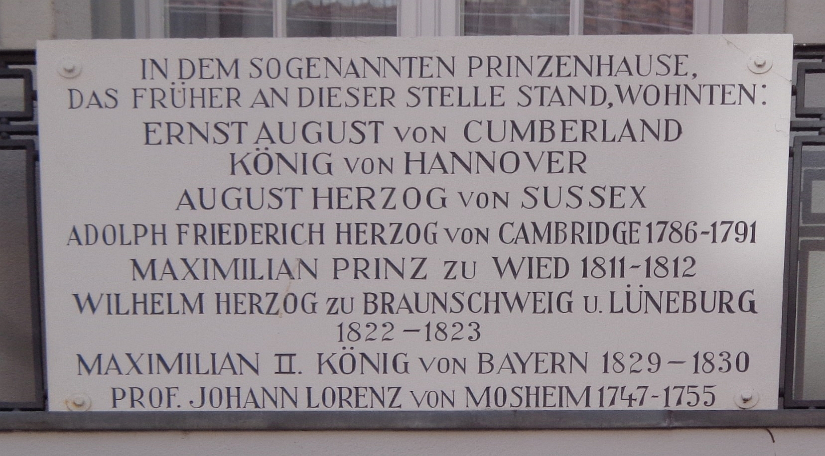 Erinnerungstafel für das frühere Prinzenhaus und seine bekannteren Bewohner in der Göttinger Prinzenstraße am Balkon des Hauses der Commerzbankfiliale Göttingen